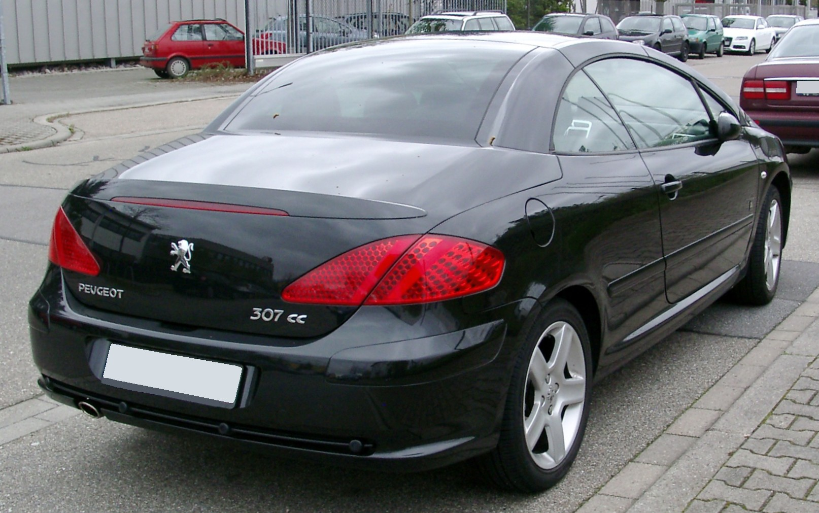 Peugeot 307 CC